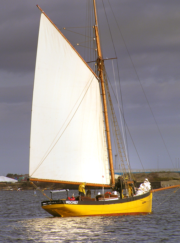 Gaff Rig